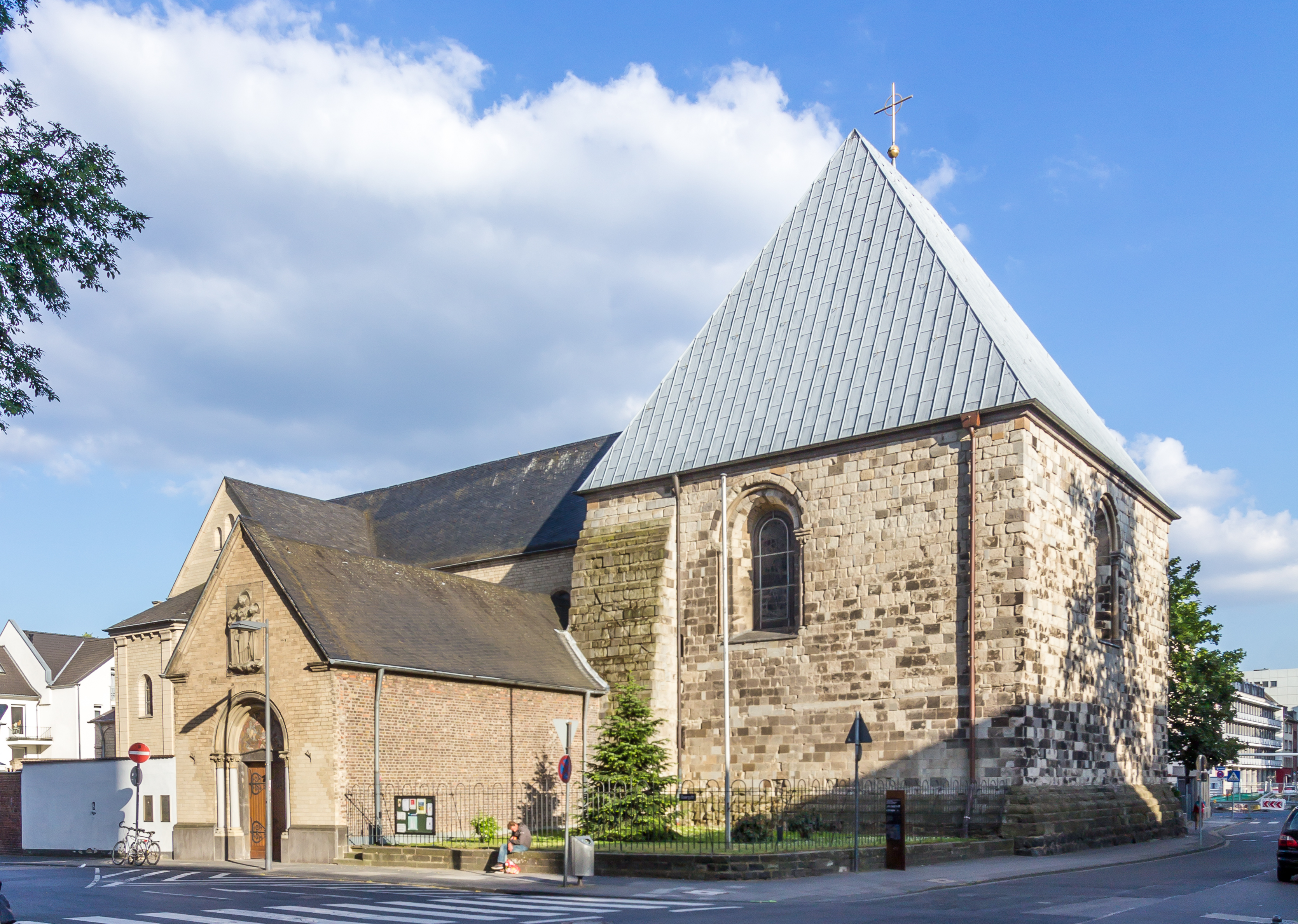 St. Georg Köln, Nordseite This is a photograph of an architectural monument.